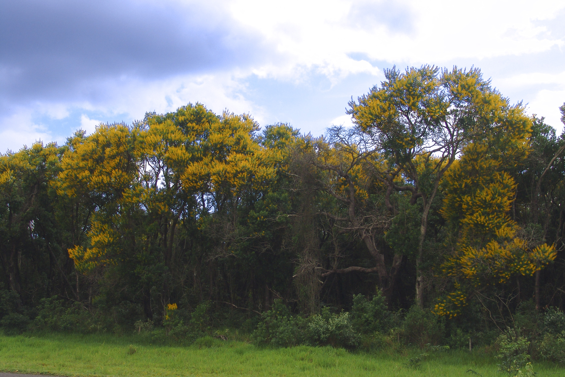 Vochysia tucanorum Mart. - Vinheiro-do-mato